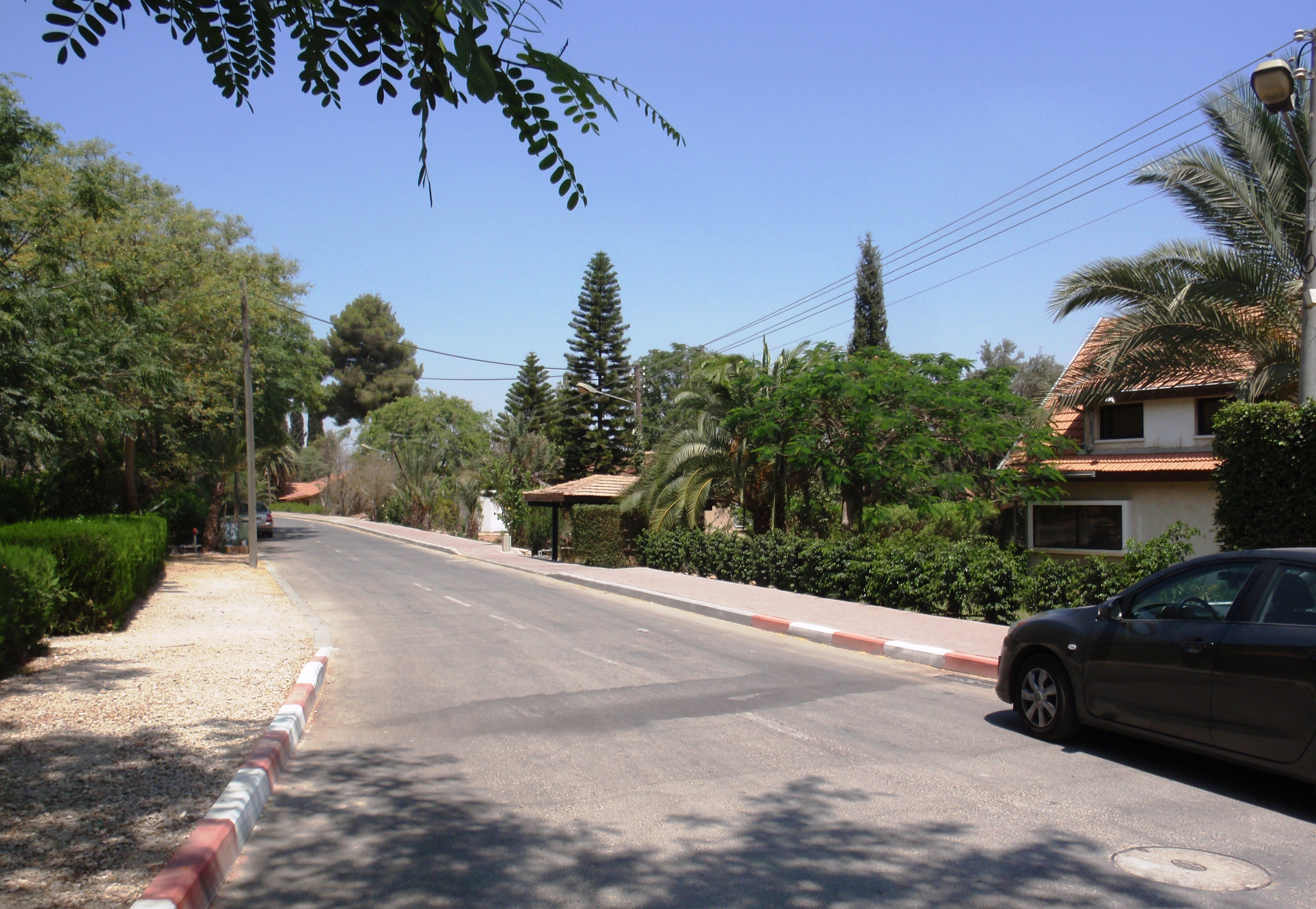 Moshavim רחוב ביישוב הקהילתי תושיה